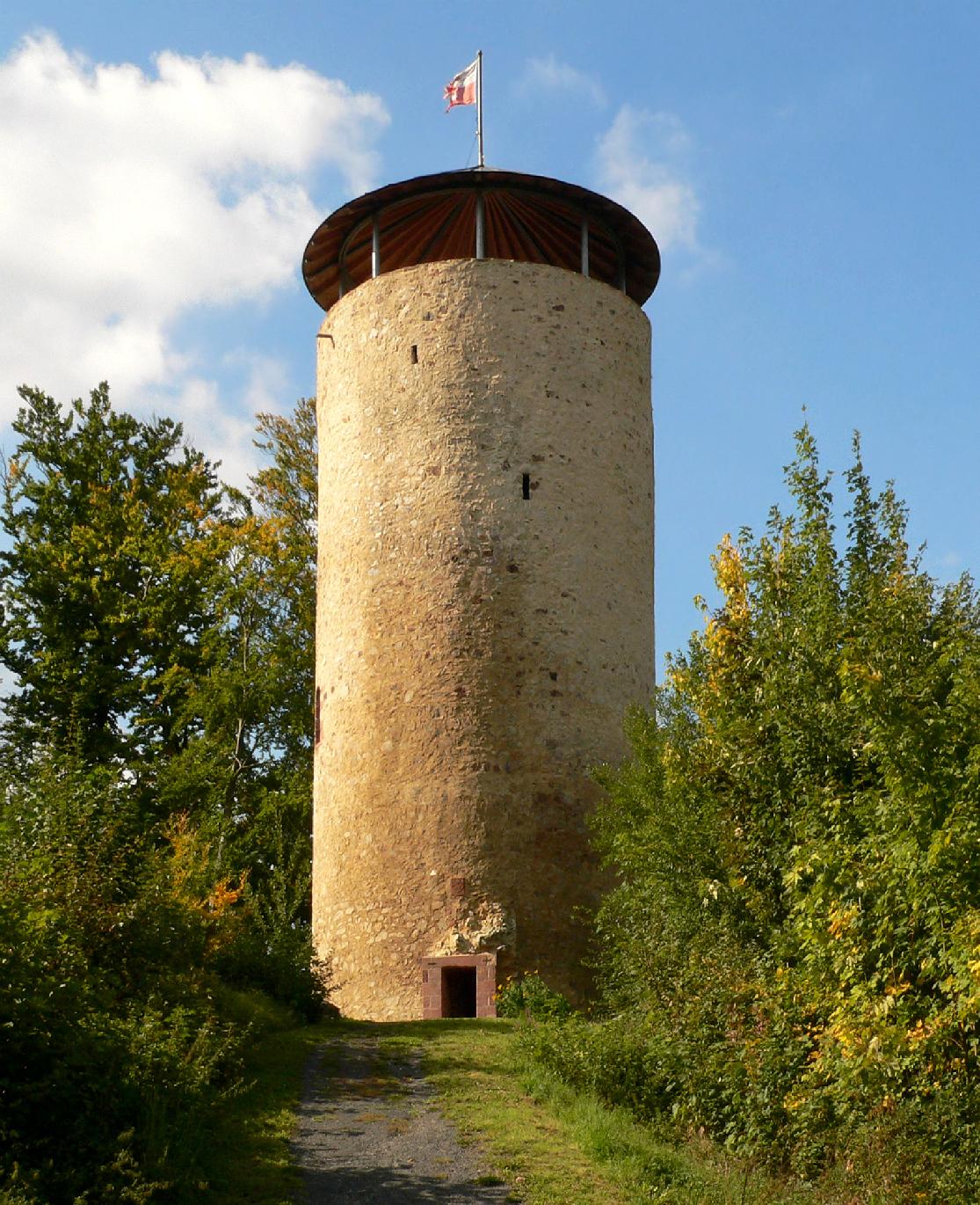 Burgruine Löwenstein